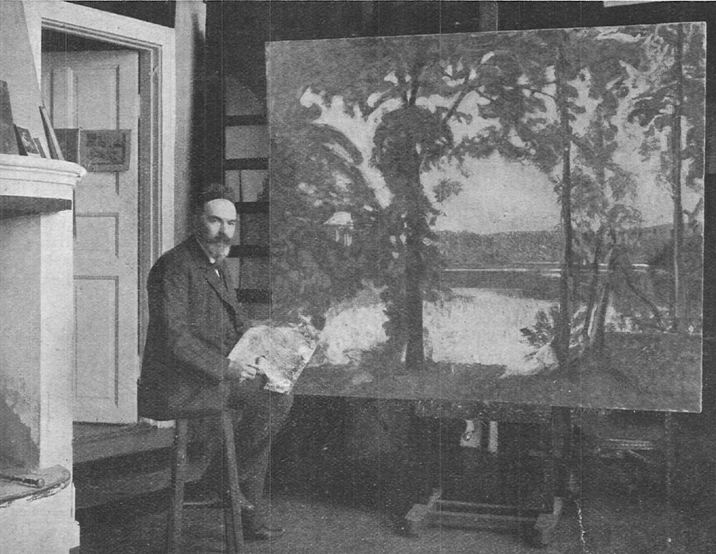 Richard Bergh i ateljén i Storängen